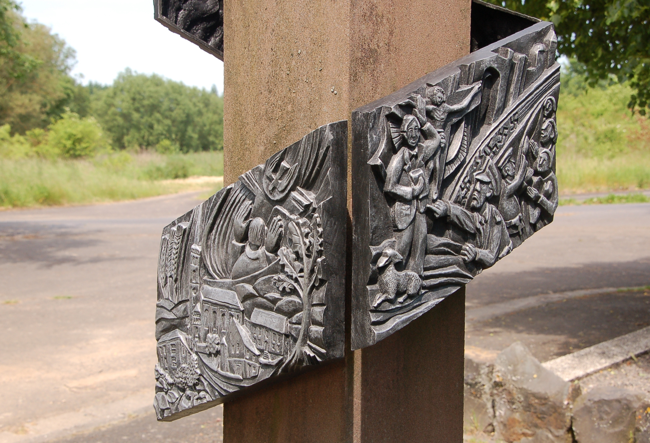 Pferdsfeld: Gedenkstele für Paul Schneider, Tafeln 1 und 2: Kindheit in Pferdsfeld sowie Verkündigung und Anfeindung in der Zeit des Nationalsozialismus